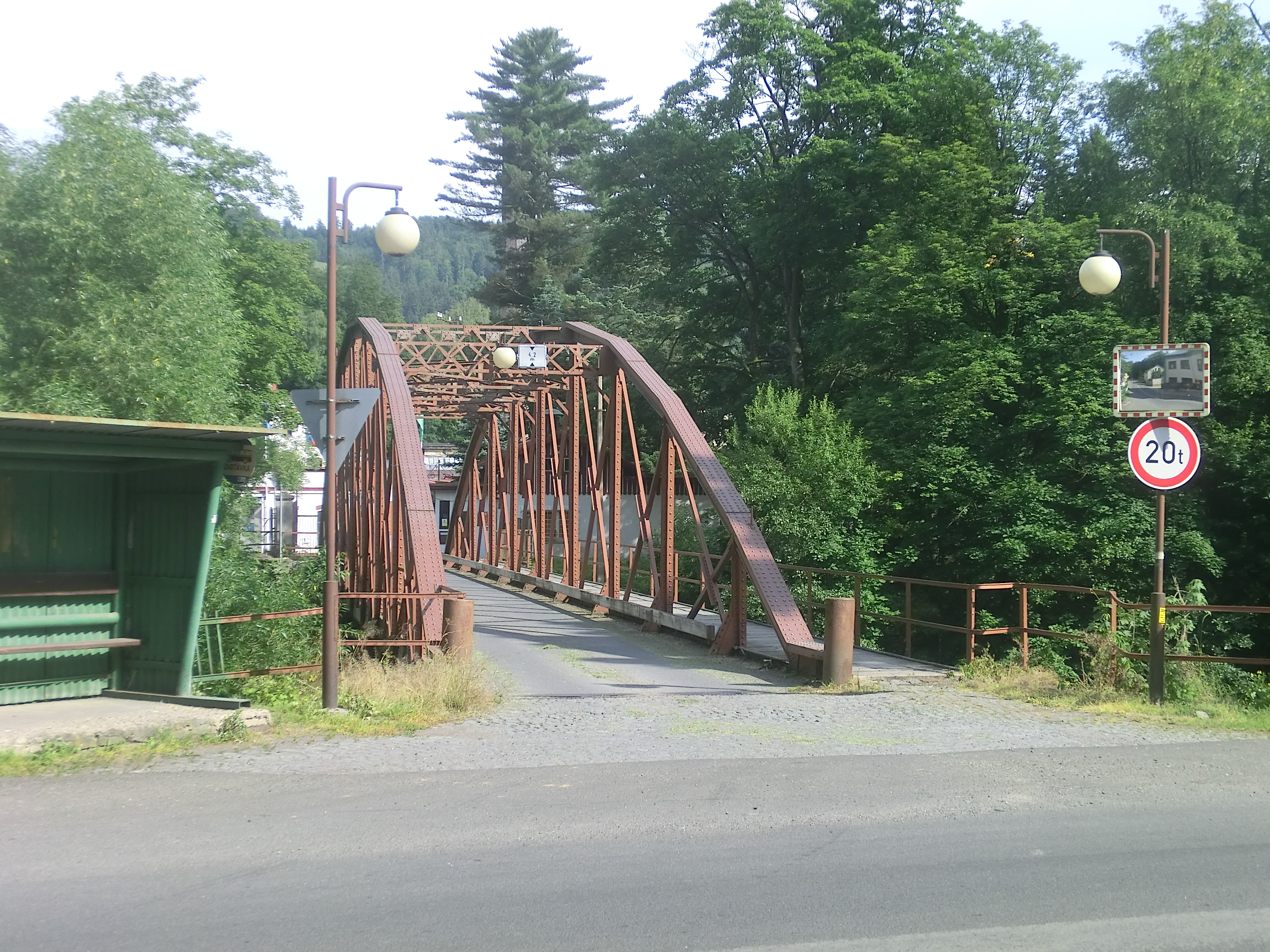 Ocelový nýtovaný most v Hájích nad Jizerou převádí místní komunikaci, která odbočuje z hlavní silnice II/292.